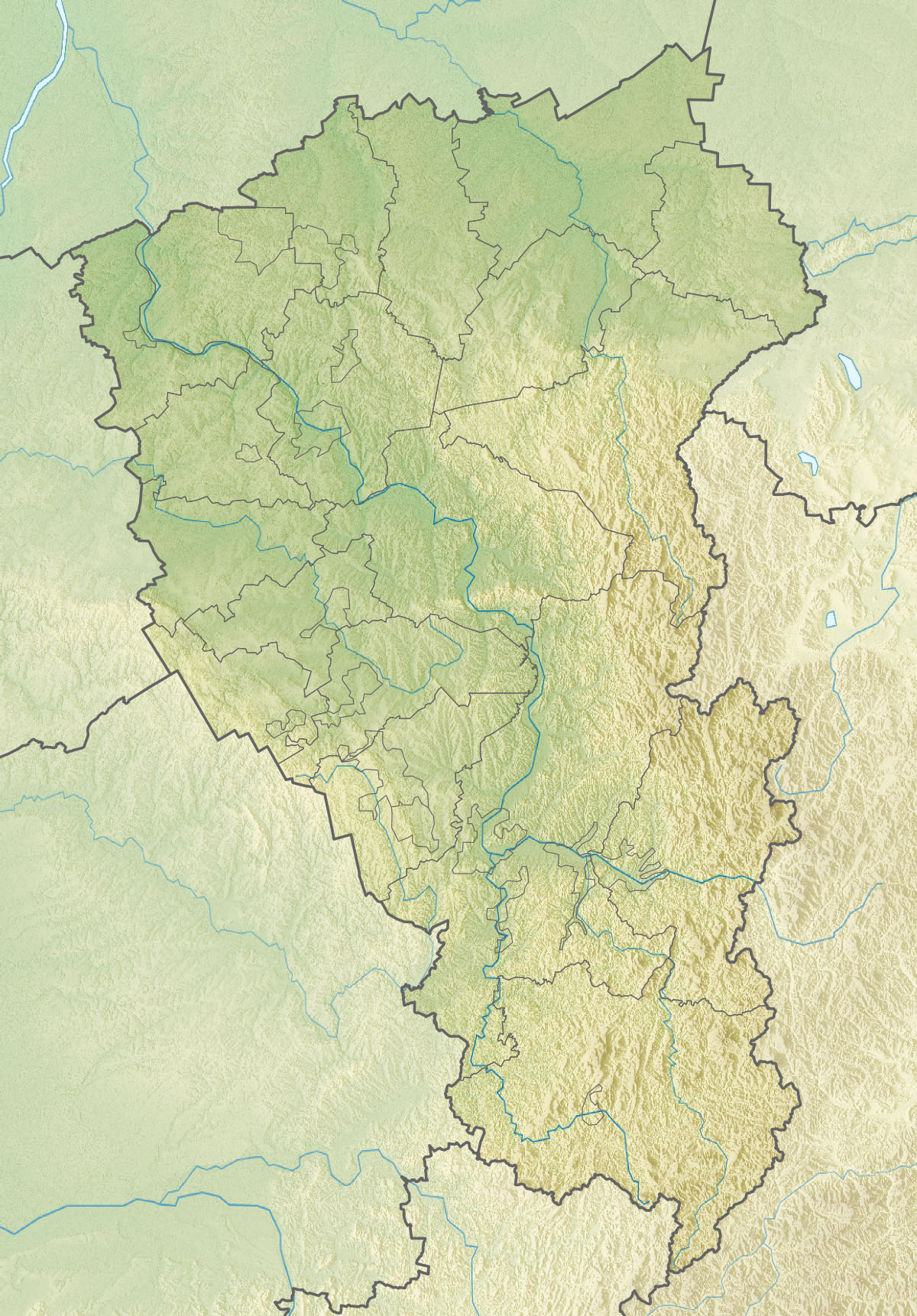 Физическая карта Кемеровской области Проекция — равноугольная. Стандартная параллель — 54°30′00″с.ш. Параметры шаблона (координаты краёв): |top = 57 |bottom = 52 |left = 84 |right = 90